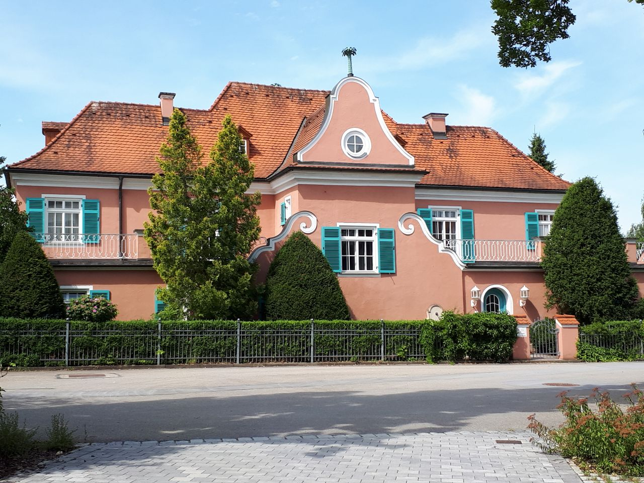 Fotografie des roten Schlössle in Memmingerberg bei Tag